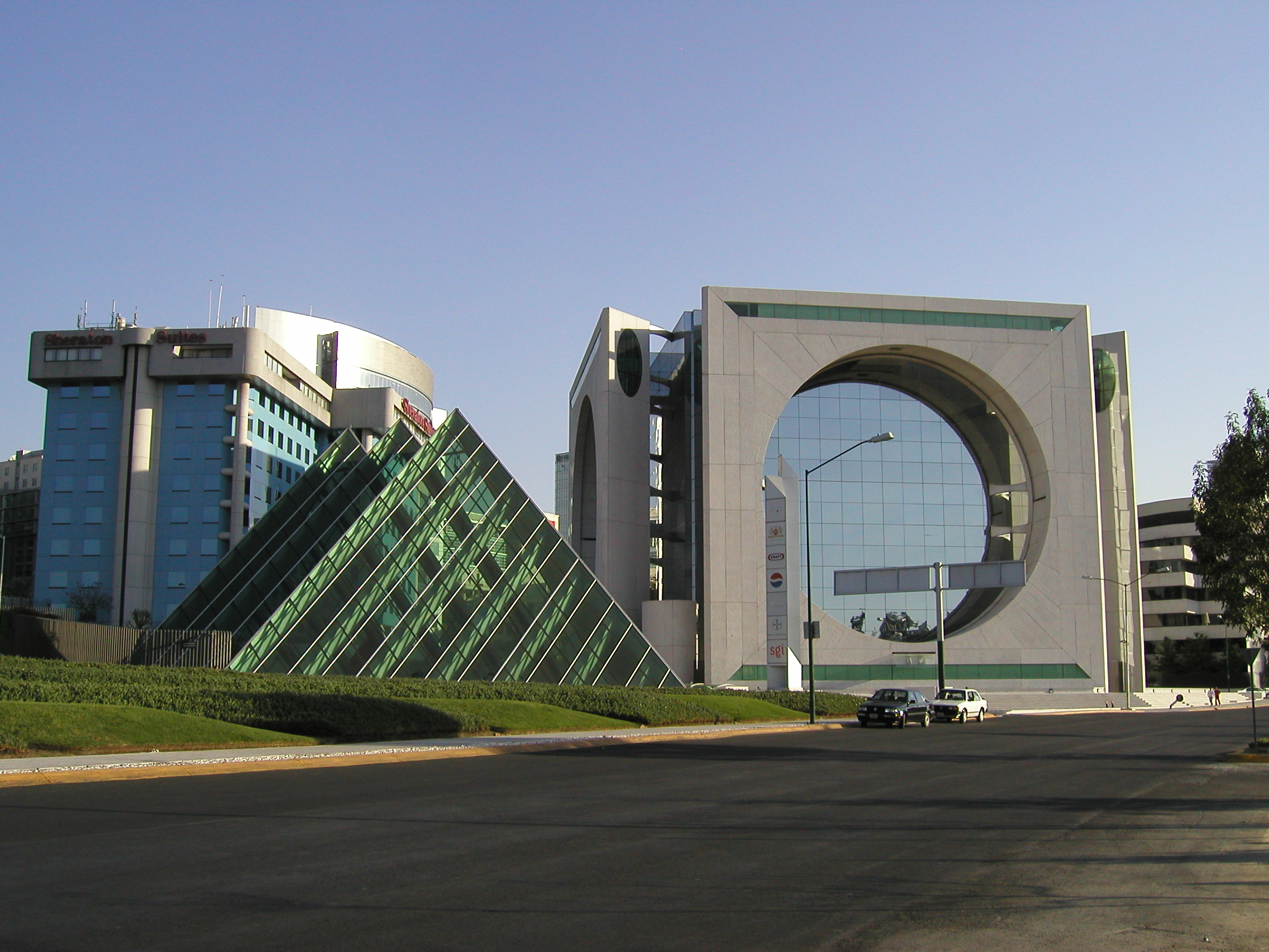 Santa Fe Ciudad de México